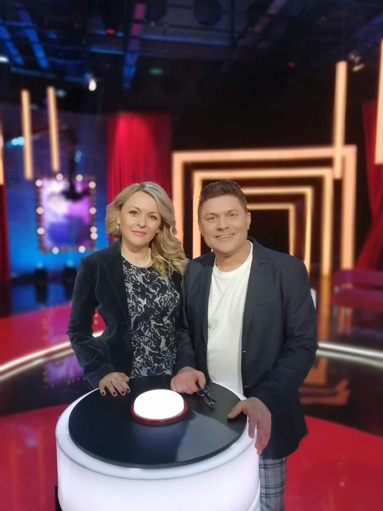 ВИА «Пламя» под руководством Юлии Ариничевой.